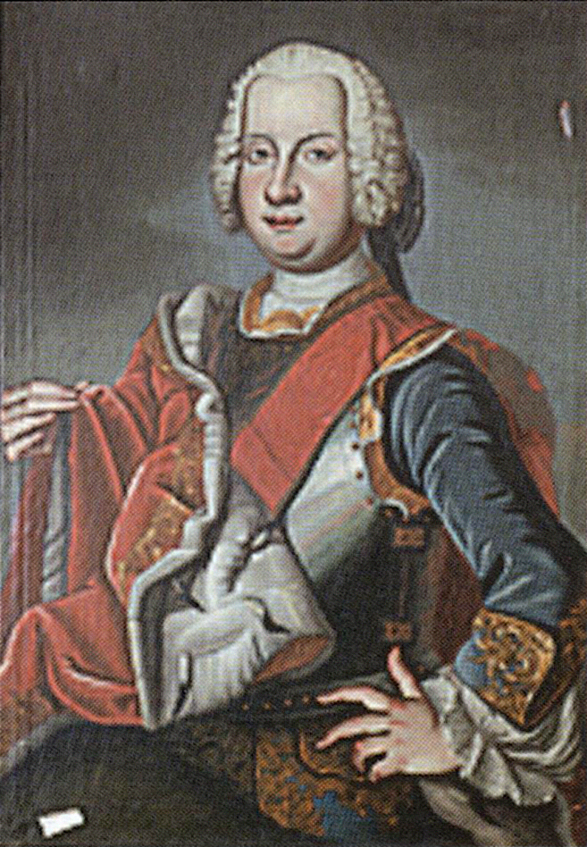 Беларуская (тарашкевіца): Партрэт Юзэфа Аляксандра Ябланоўскага (Juzef Alaksandar Jabłanoŭski)